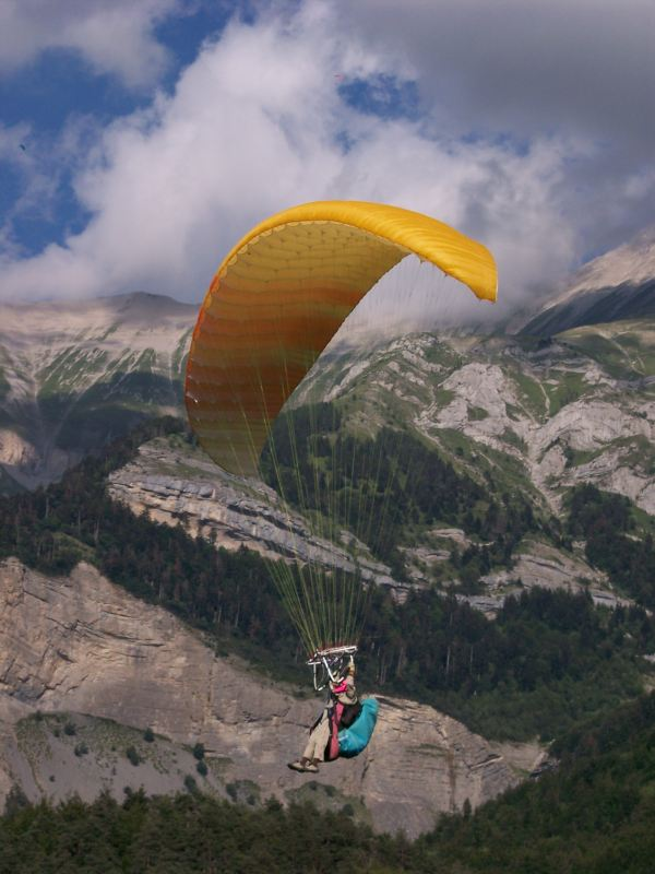 Une cage de pilotage se préparant à atterrirr sur le site de Courtet